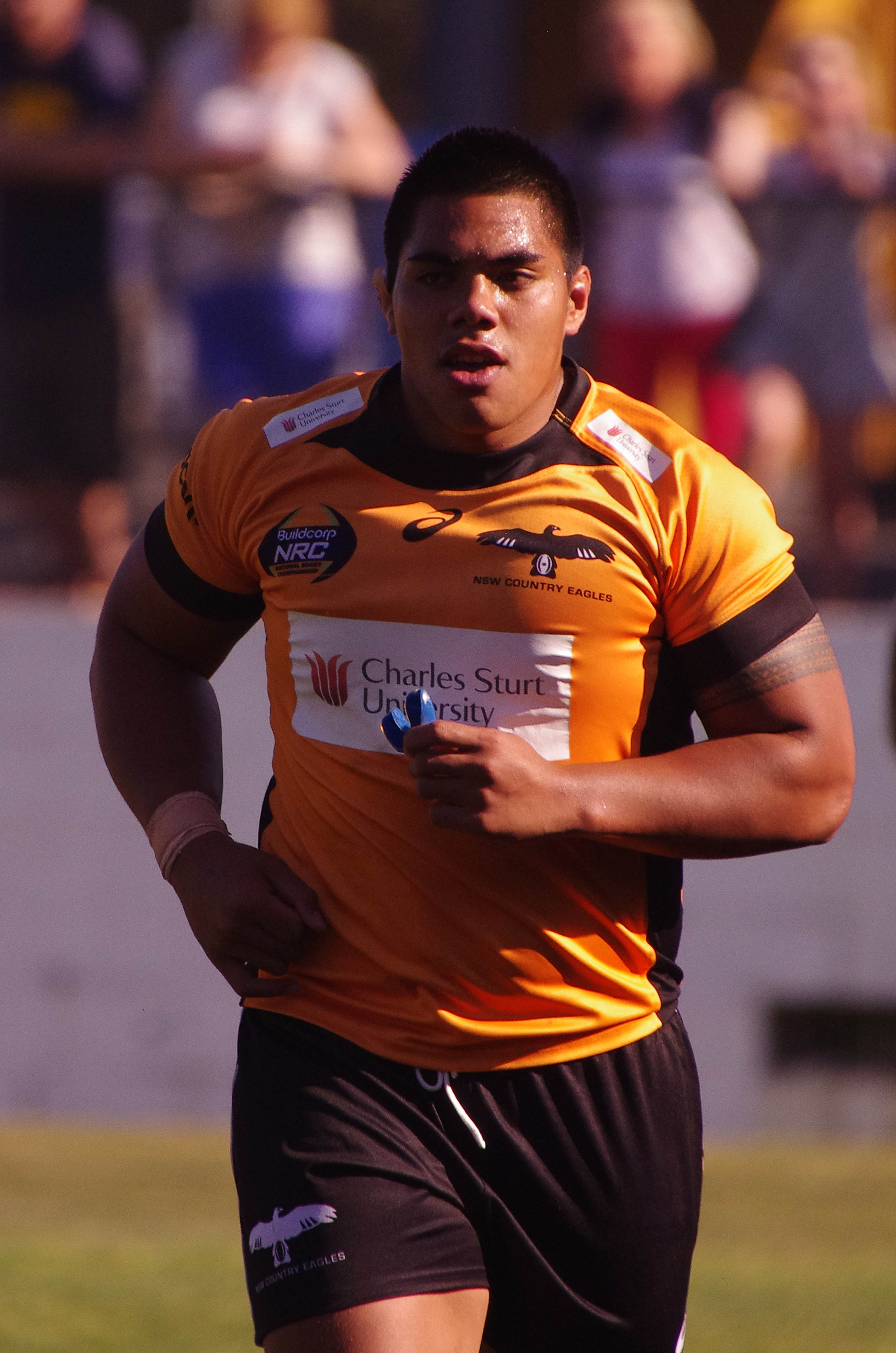 MICHAEL ALAALATOA